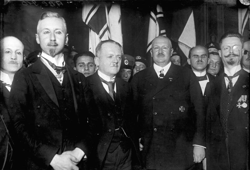 Die Bannerweihe der Ortsgruppe Neukölln fand unter großer Beteiligung Deutschnationaler Verbände und unter Anwesenheit des Prinzen Eitel-Friedrich und des Prinzen Oskar von Preußen in der "Neuen Welt" statt. Der Führer der Deutschnationalen Volkspartei Graf Westarp, hielt die Ansprache. v.li.n.re.: Prinz Oskar von Preußen, Graf Westarp, Prinz Eitel-Friedrich.